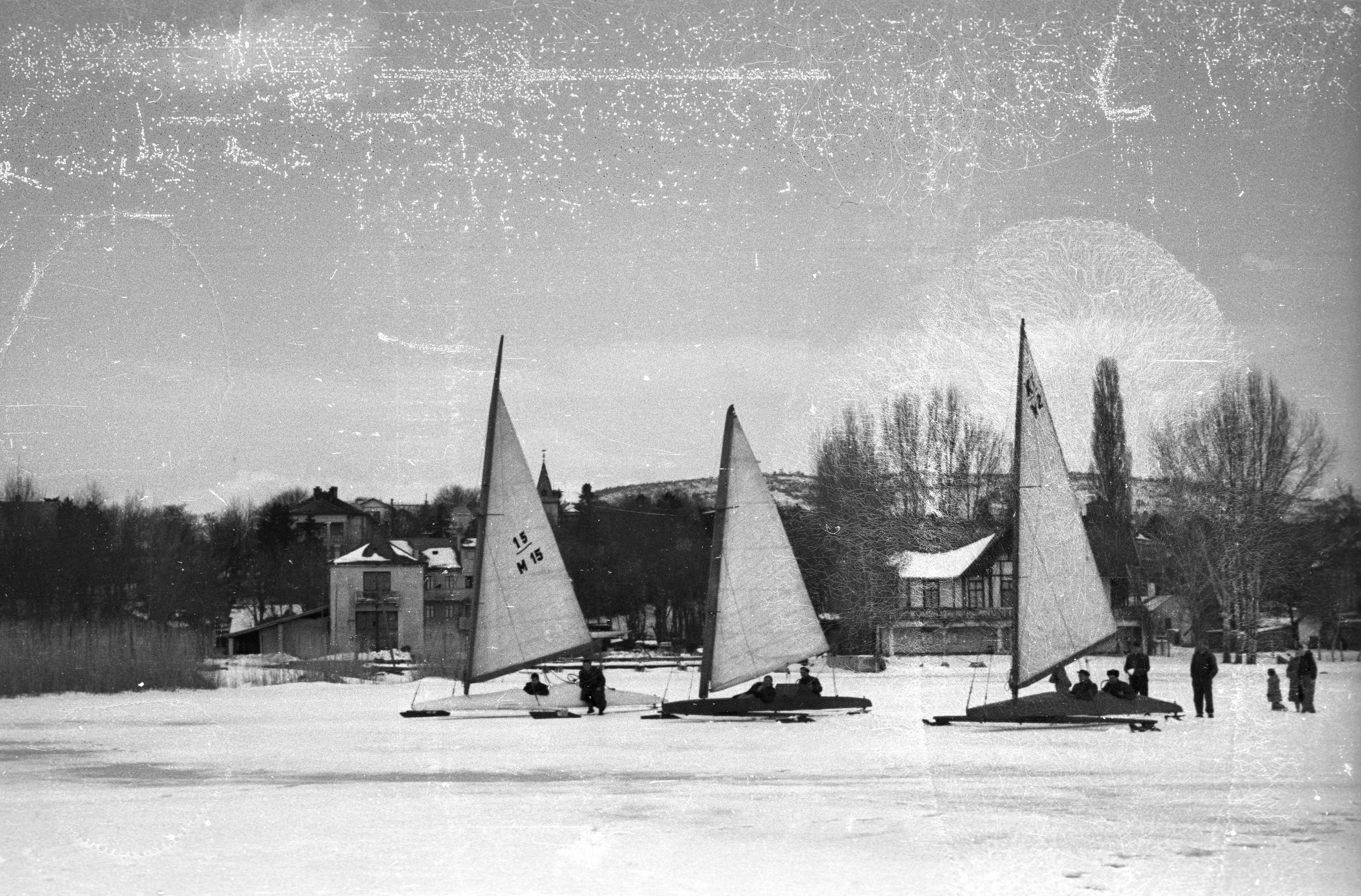 a befagyott Balaton a hajóállomásnál. A parton a Yacht Club és a Vitorlás étterem épületei. Location: Hungary, Balatonfüred Tags: winter Title: a befagyott Balaton a hajóállomásnál. A parton a Yacht Club és a Vitorlás étterem épületei.